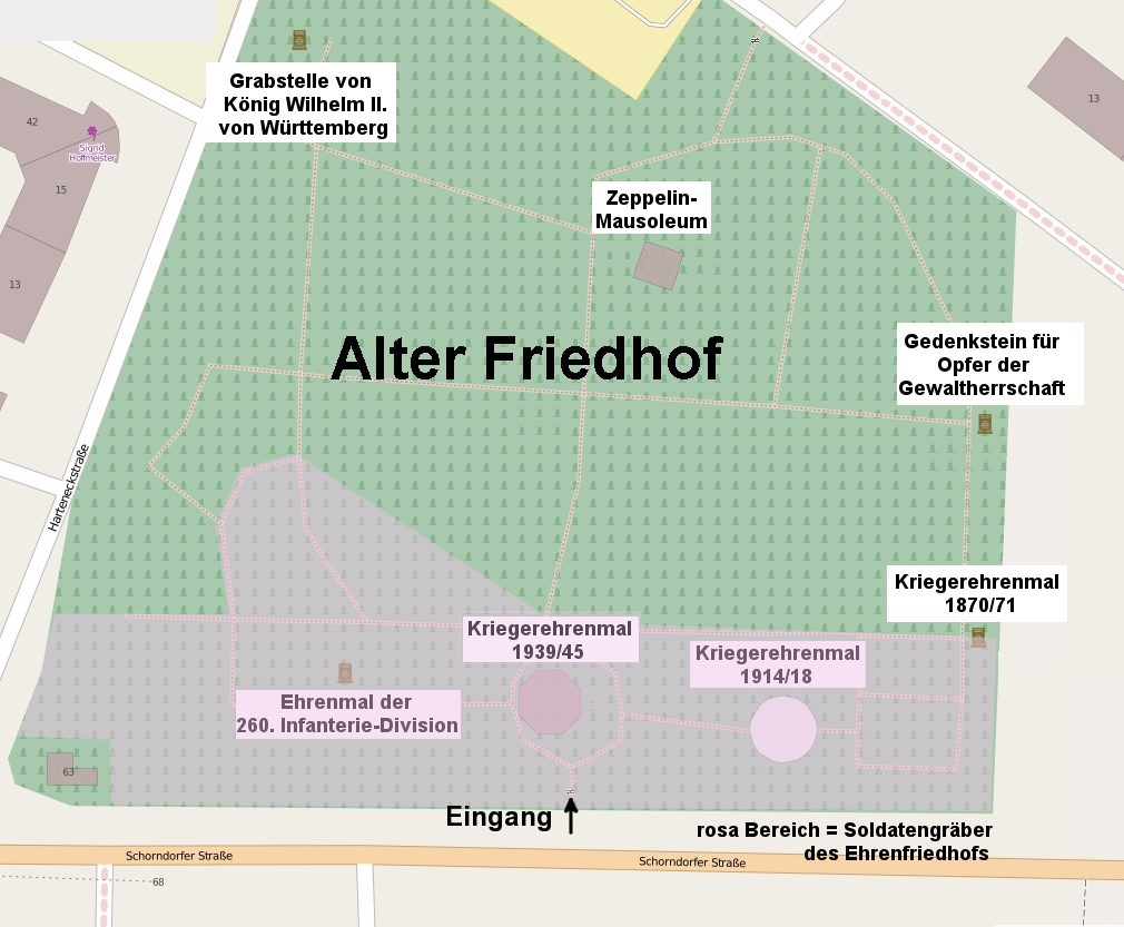 Lageplan Alter Friedhof (Ludwigsburg).